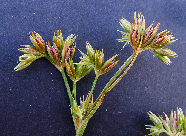 Juncus pygmaeus